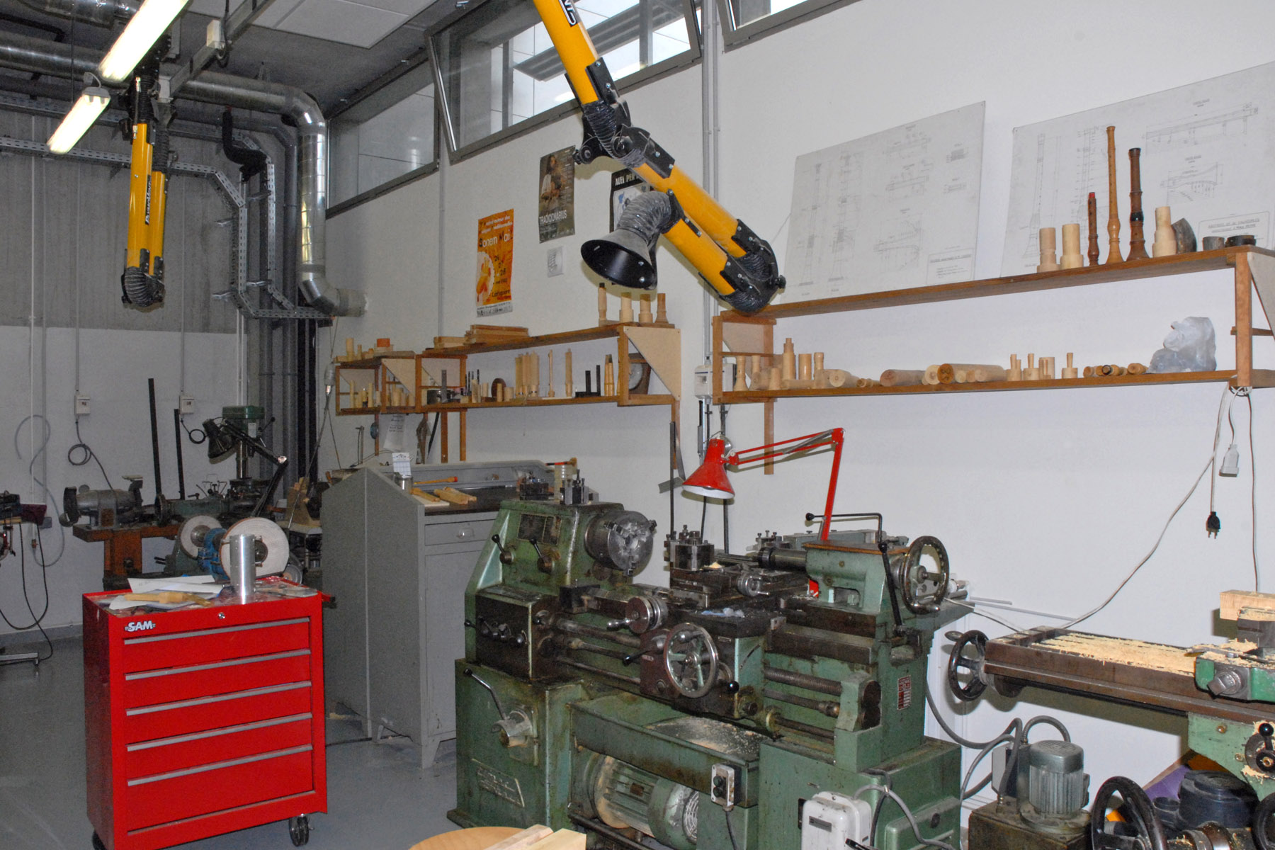 Le Centre Occitan des Musiques et Danses Traditionnelles (COMDT) Toulouse Midi-Pyrénées est un lieu de ressources consacré, à travers ses différents secteurs, à la culture occitane de tradition orale, principalement dans les domaines de la musique instrumentale, de la danse et du chant traditionnels. Il est membre de la FAMDT, Fédération nationale des Centres régionaux et associations de musiques et danses traditionnelles. Depuis sa création (30 ans) l’atelier de lutherie collabore avec d’autres chercheurs à la reconstitution d’instruments. Ainsi, il a pris une part importante dans le renouveau des flûtes, cornemuses et hautbois occitans. Il participe actuellement à une recherche interrégionale sur la bodega ou craba (cornemuse de la Montagne Noire). L’atelier de facture instrumentale réalise des aboès (hautbois du Couserans) : tonalité en Ré ; des hautbois de Valhourles (Rouergue) : tonalité en Sol et des boha (cornemuse des Landes de Gascogne) : tonalité en La et en Sol.